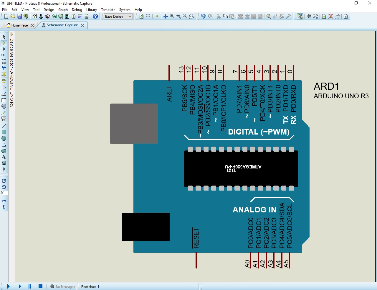 نرم افزار شبیه سازی مدارات الکترونیکی